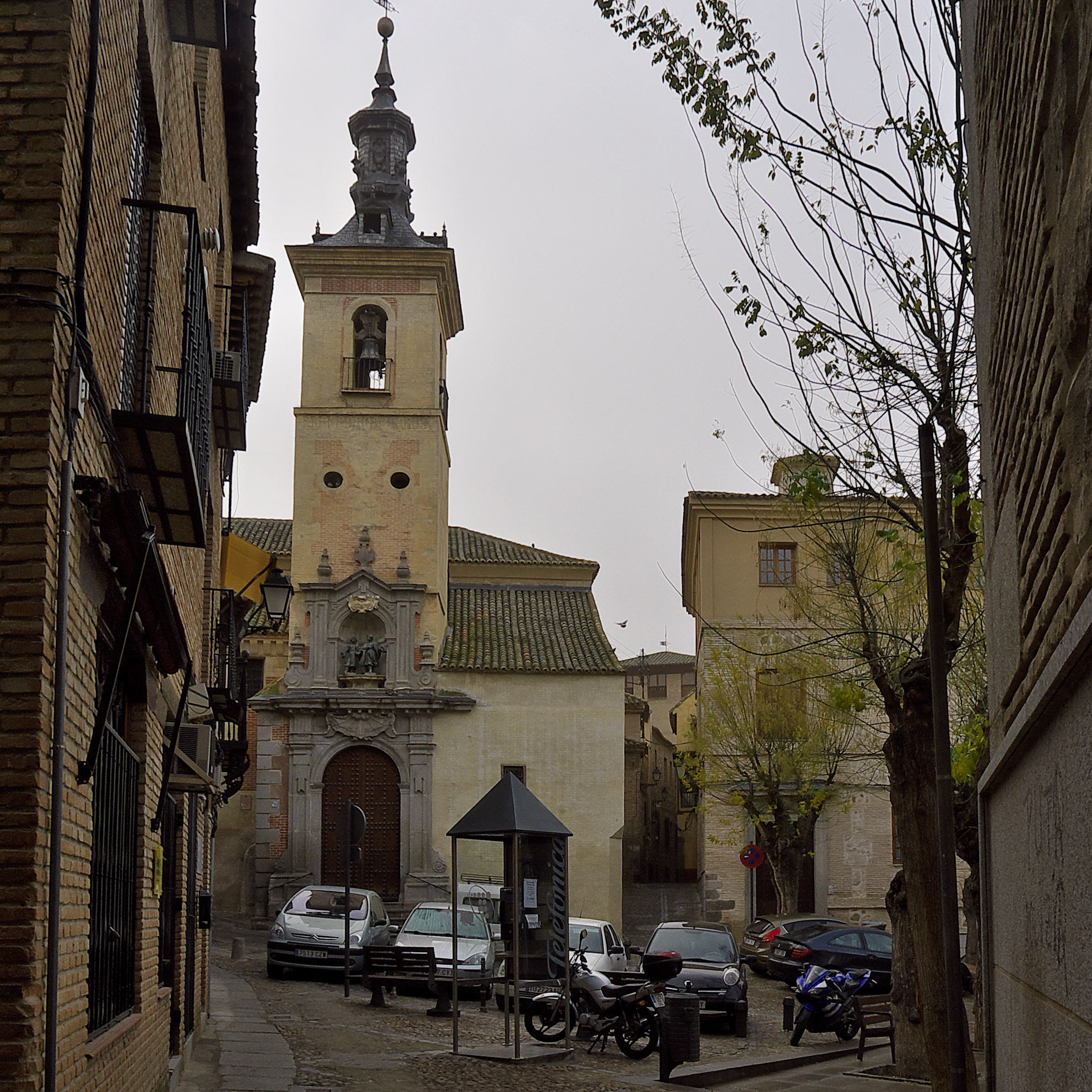 Fachada principal de la iglesia